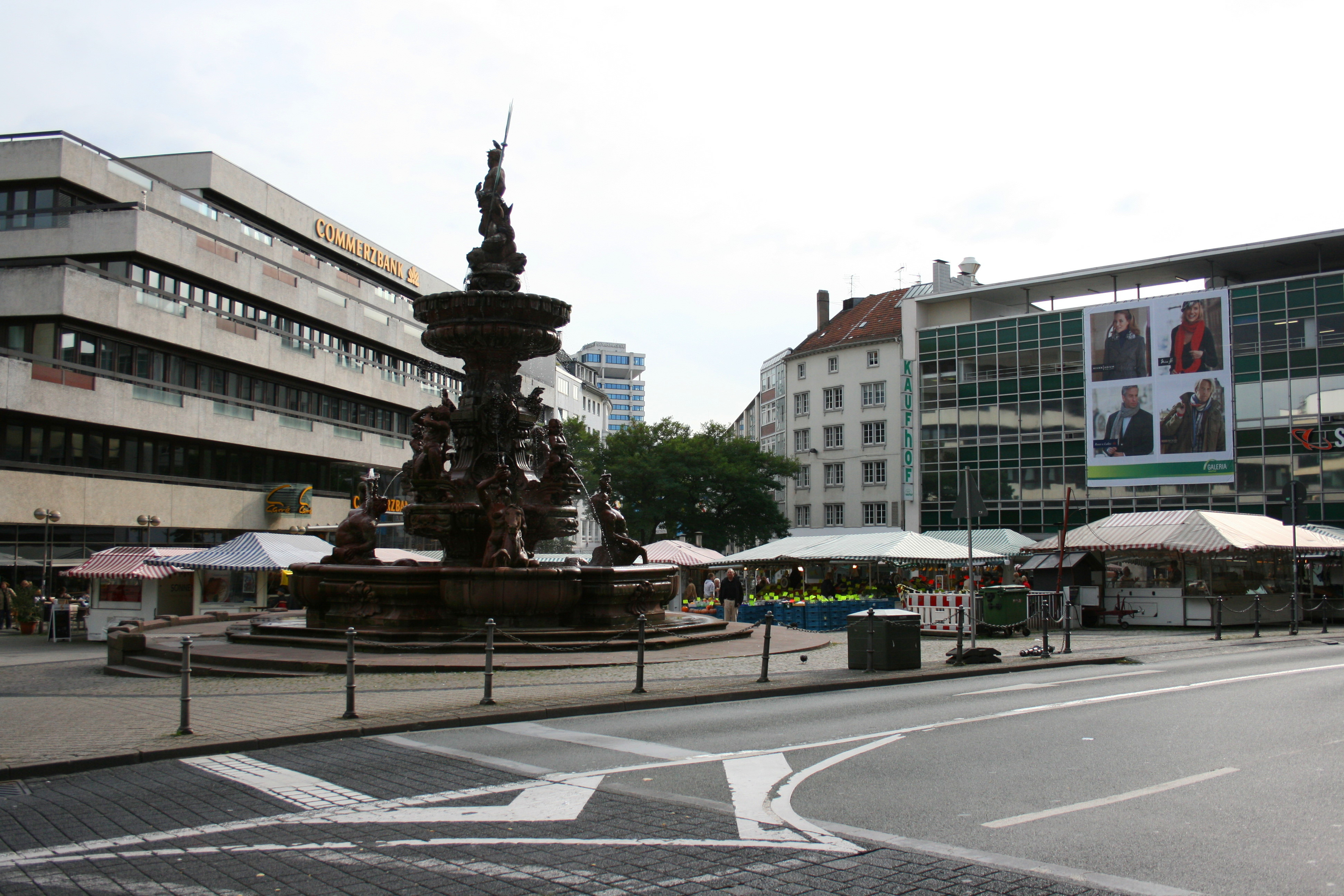 Neumarkt in Wuppertal